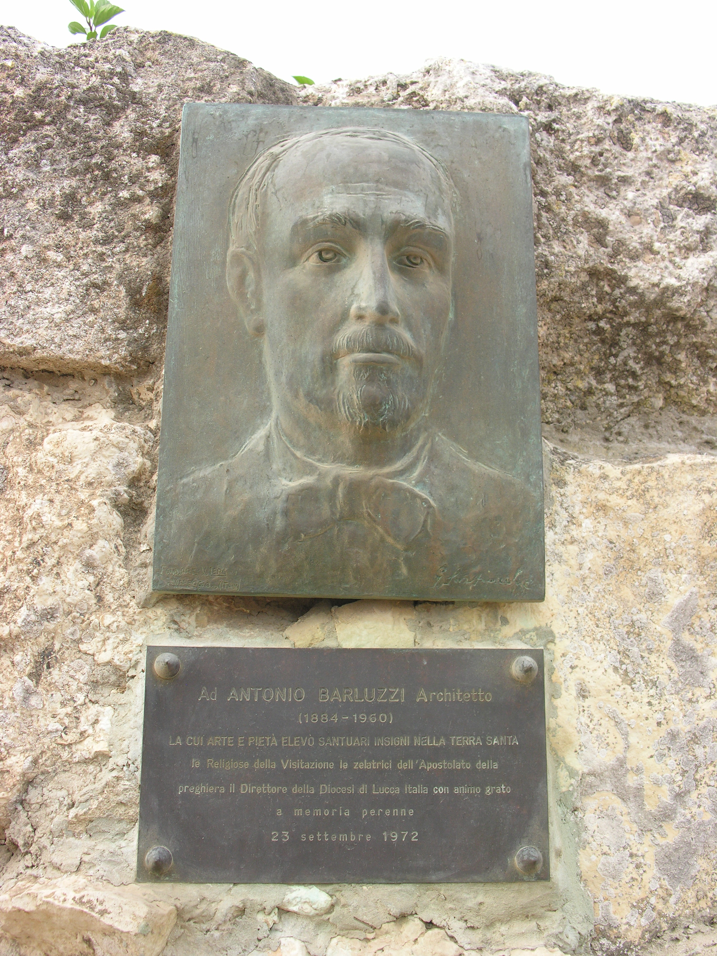 Tablica ku czci Antonio Barluzziego na Górze Tabor. Plaque for Antonio Barluzzi on Mount Tabor.